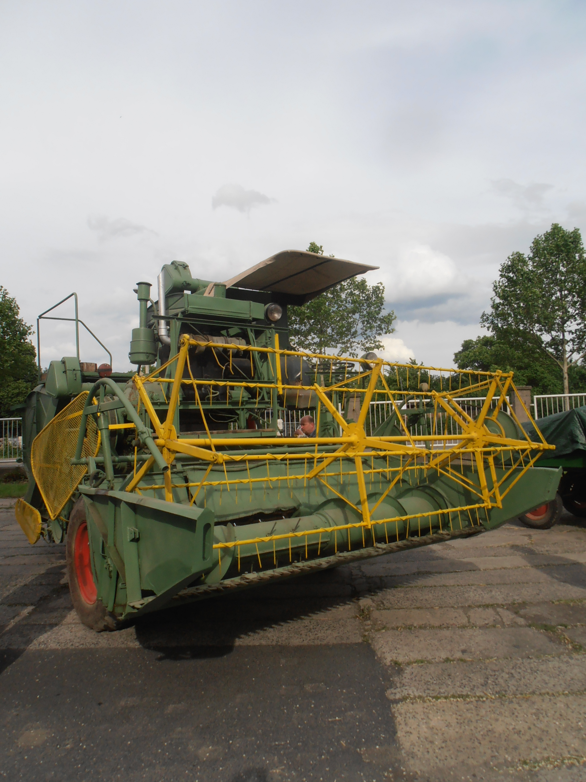 Ansicht von Links vorn zum Tag der offenen Tür der Dresdener Mühle